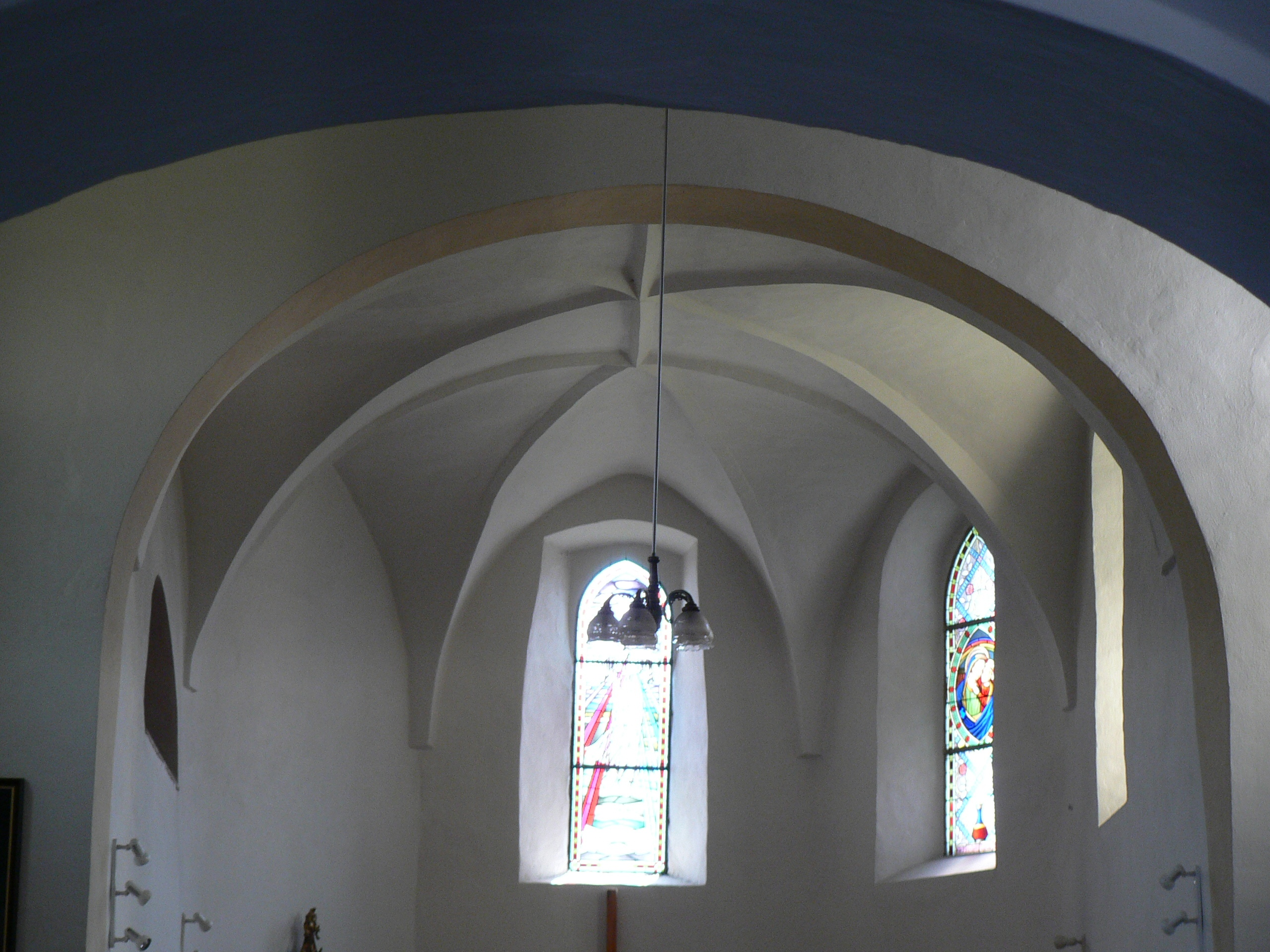 Kostel Tří králů (Břidličná) - hřebínkové klenby v presbytáři